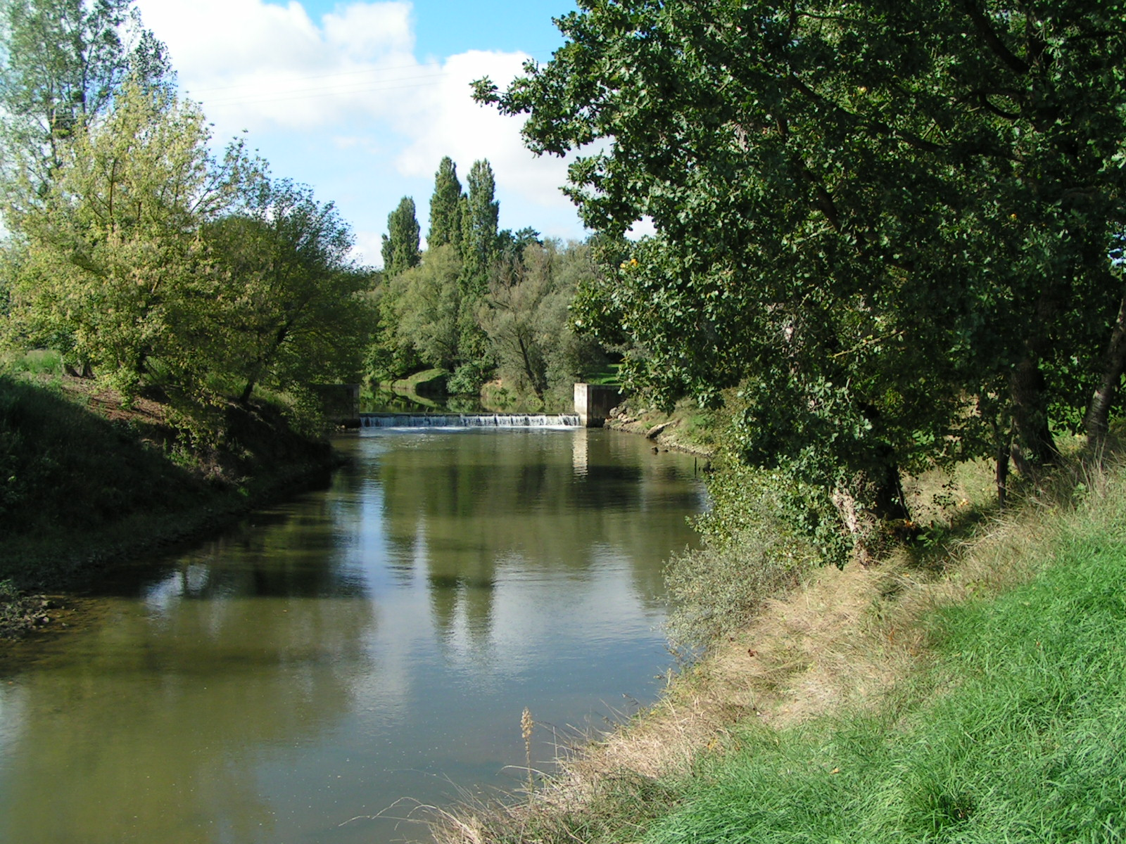 L'Arize à Carbonne (Haute-Garonne, France).